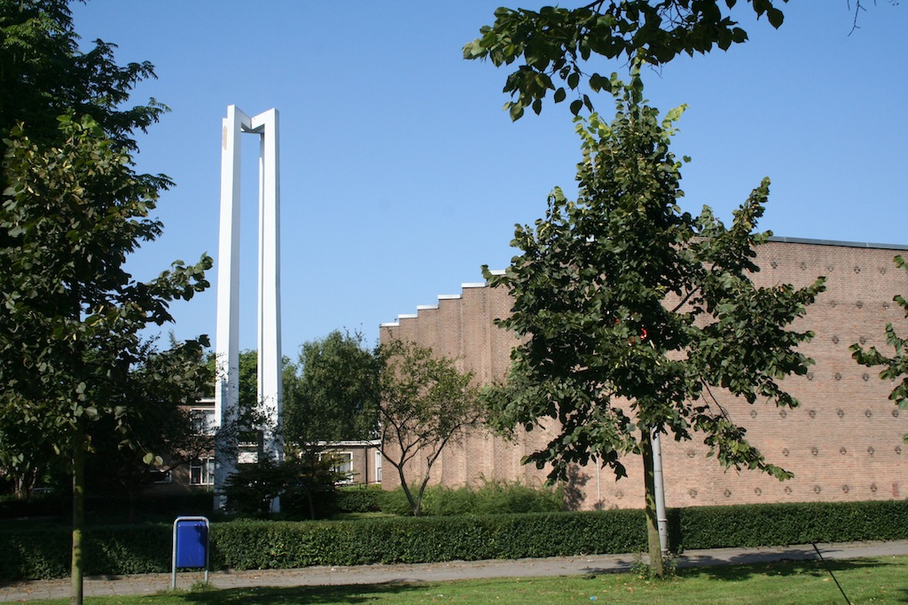 De Kandelaar (Slotermeer), 1963; Burgemeester Vening Meineszlaan 64, Slotermeer, Amsterdam Nieuw-West, architect: Geert Kliphuis. Sinds 1973: Leger des Heils. Foto: Erik Swierstra.